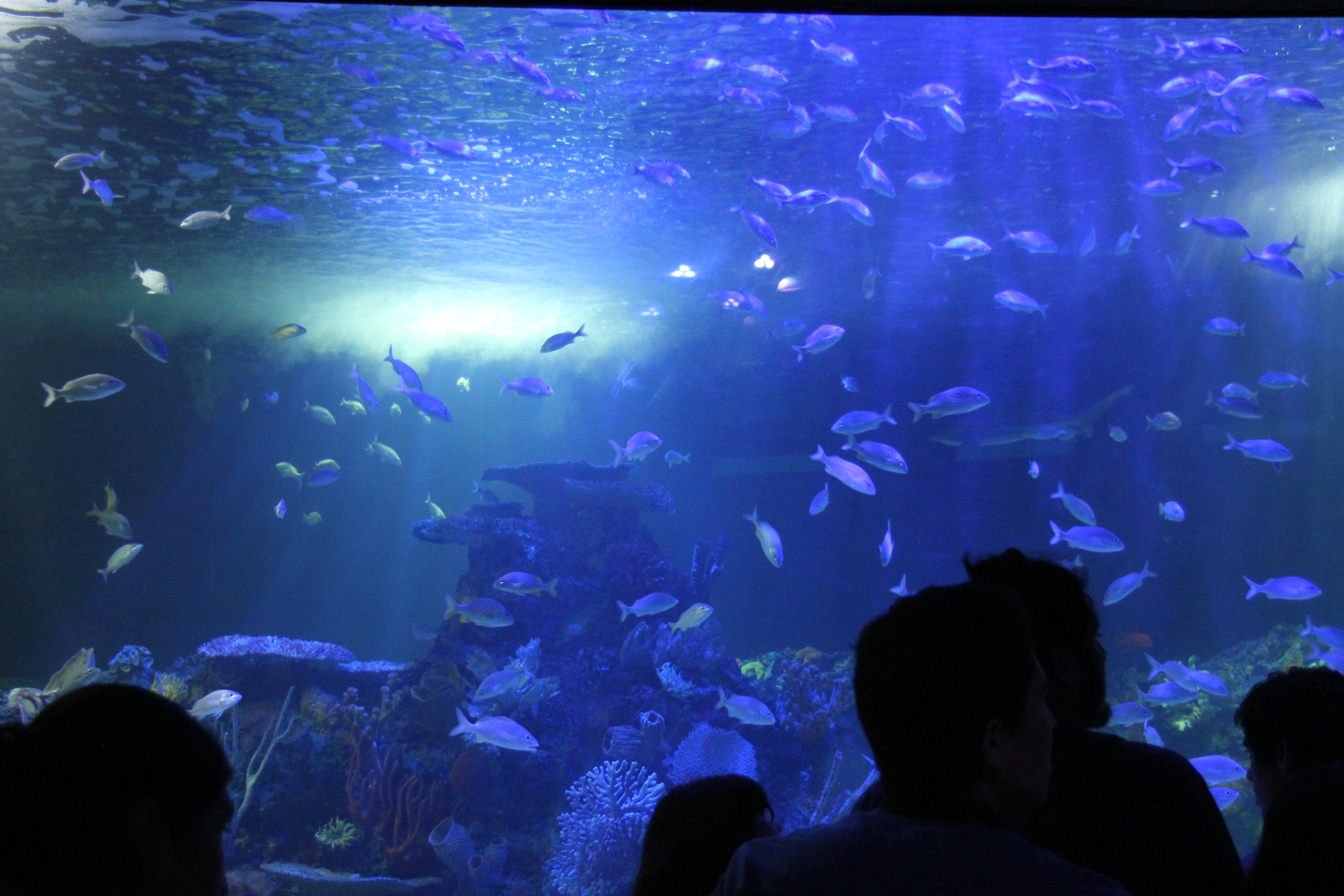 Vista panorámica del tanque principal del acuario, con algunas personas en ella. Acuario Inbursa, Ciudad de México, México.